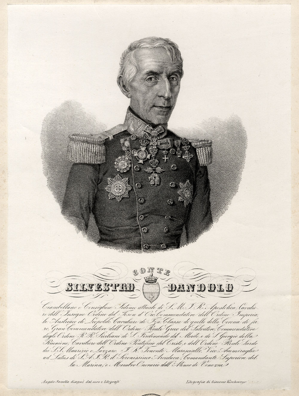 Conte Silvestro Dandolo